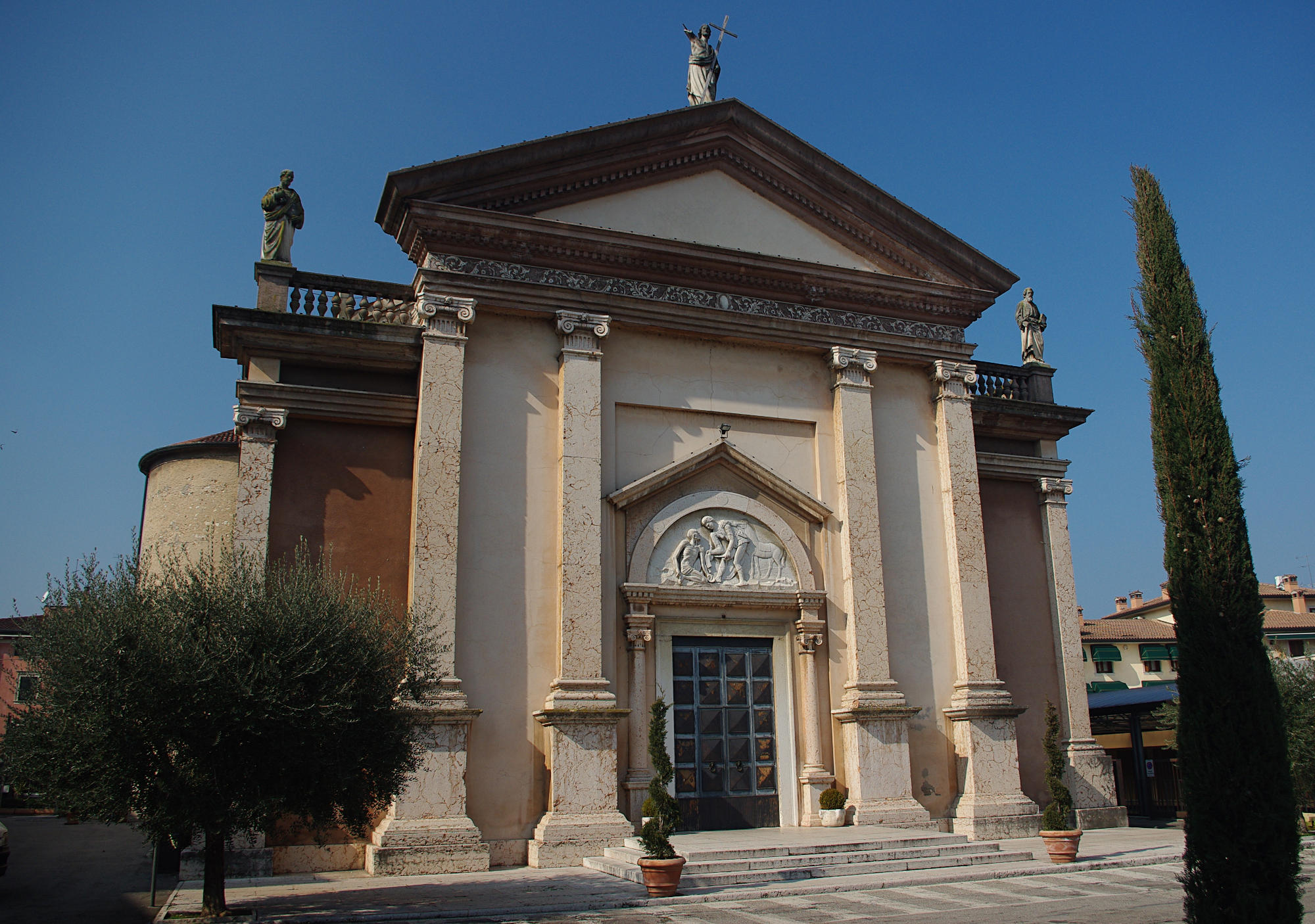 Chiesa San Martino, Peschiera del Garda (VR), Italia